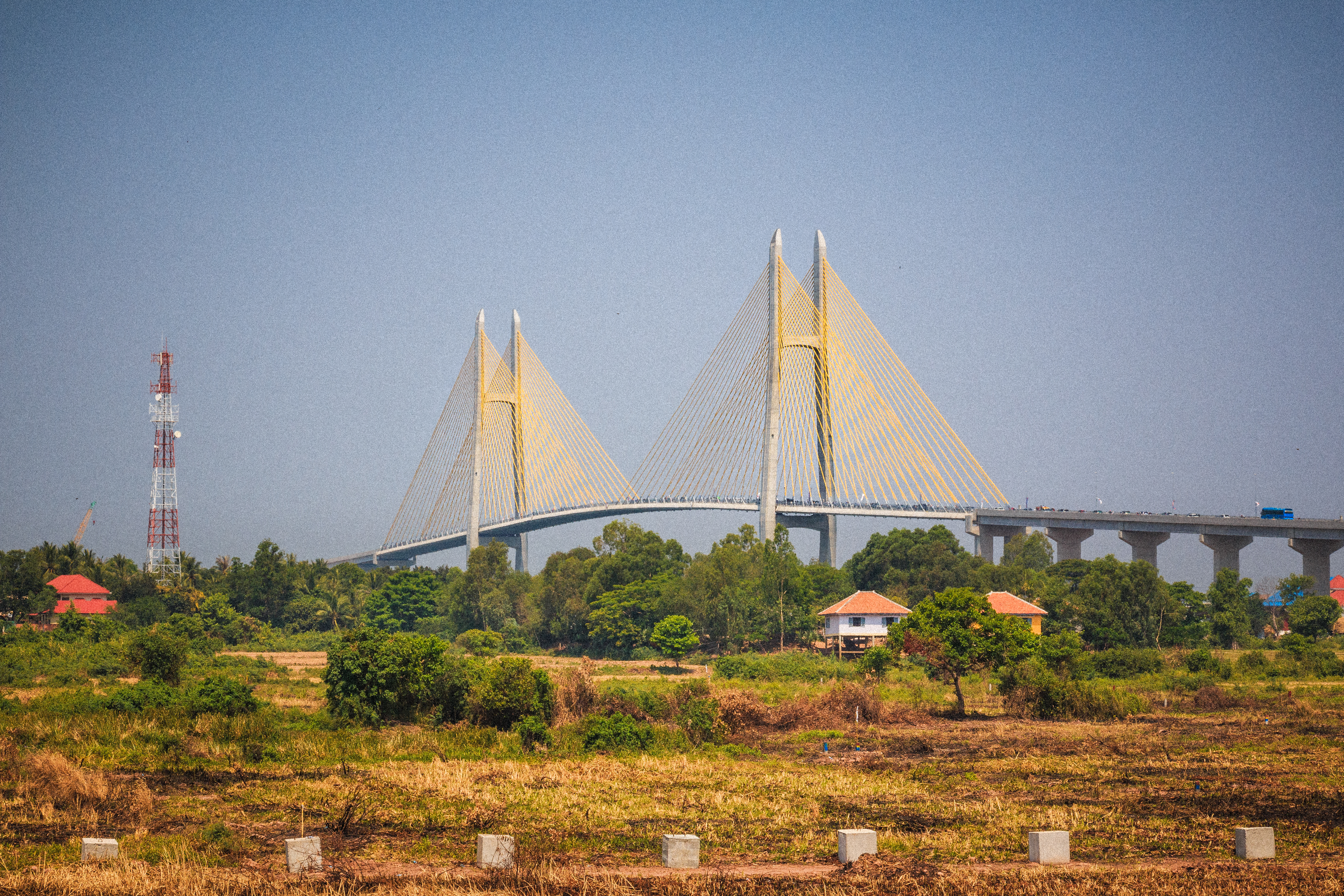 Neak Loeung Bridge